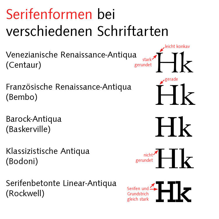 Serifenformen bei verschiedenen Schriftarten